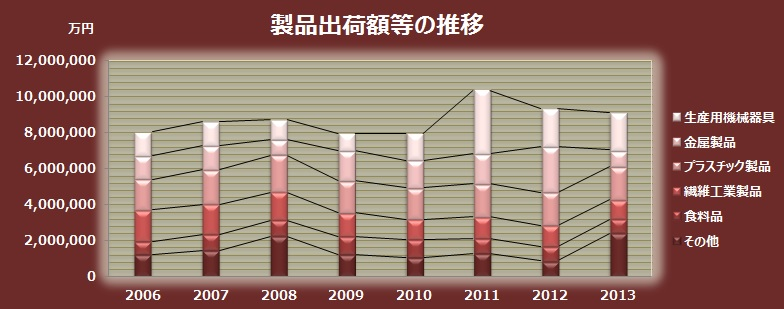 2006年以降における見附市の主な業種別の製造出荷額等推移